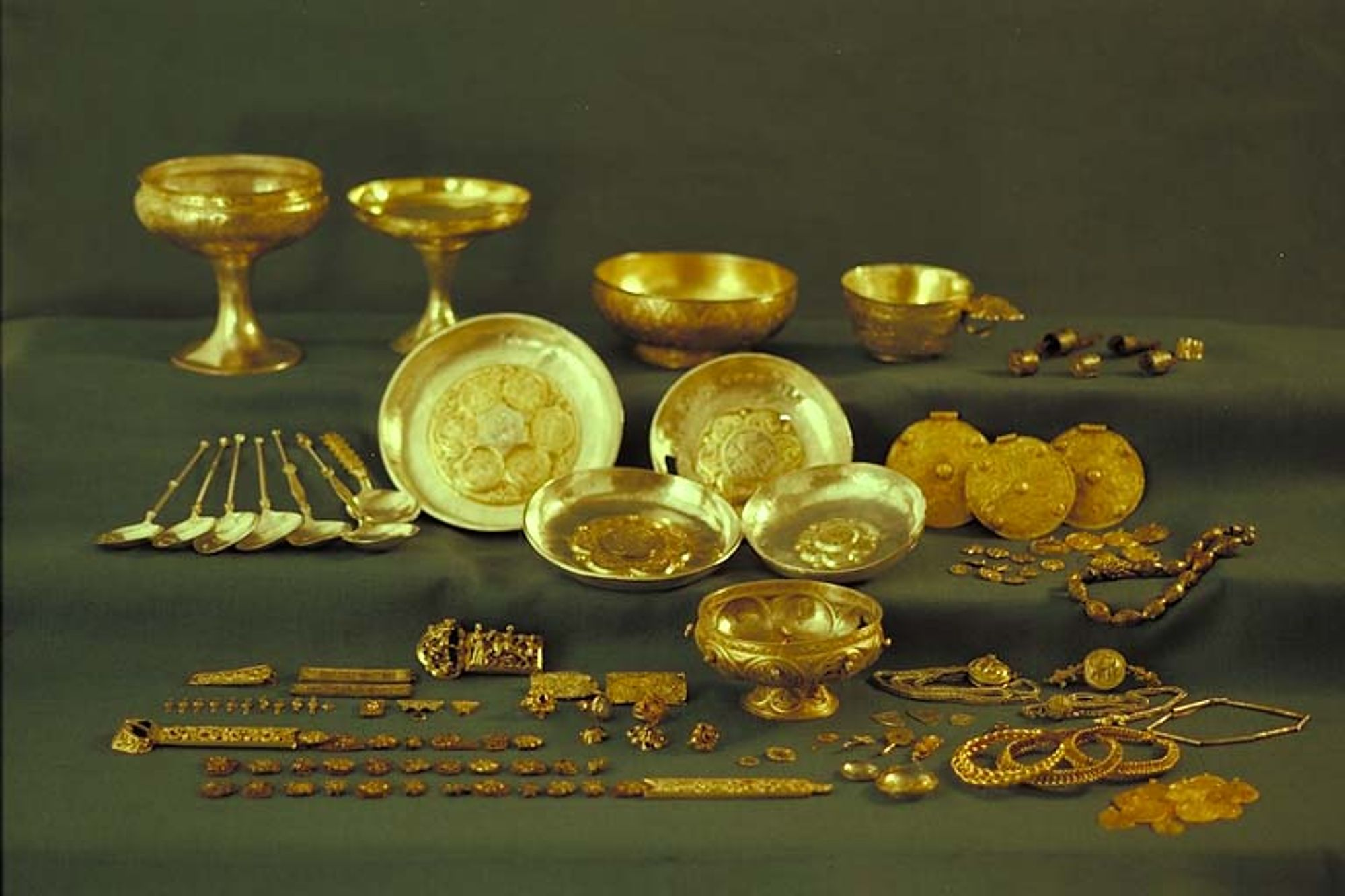 Duneskatten, Statens historiska museum